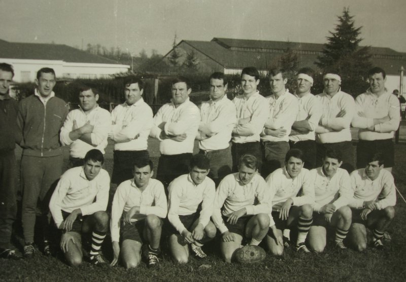 Equipe Fumel 1966